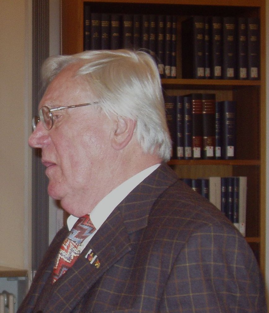 Horst Fuhrmann in der Bibliothek der Monumenta Germaniae Historica (MGH)